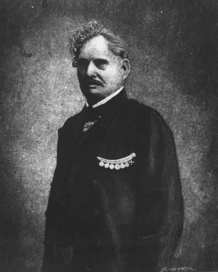 Шервуд-Верный, Иван Васильевич